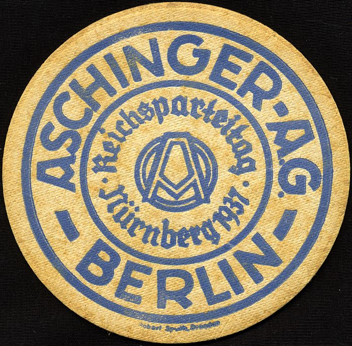 Aschinger-Bierdeckel mit Aufdruck "Reichsparteitag Nürnberg 1937".